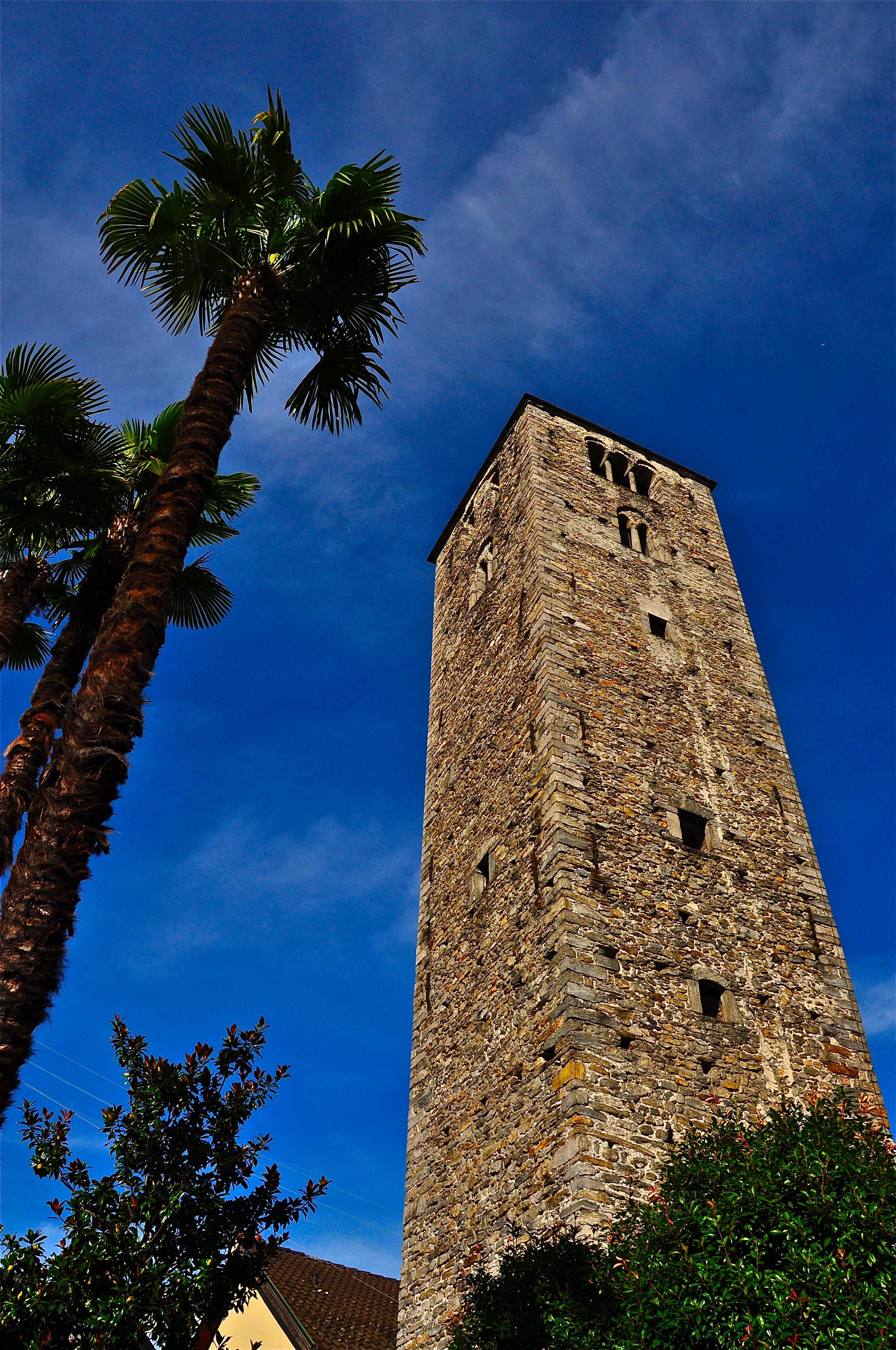 Nella torre della Chiesa il massiccio campanile dei secoli XII-XV